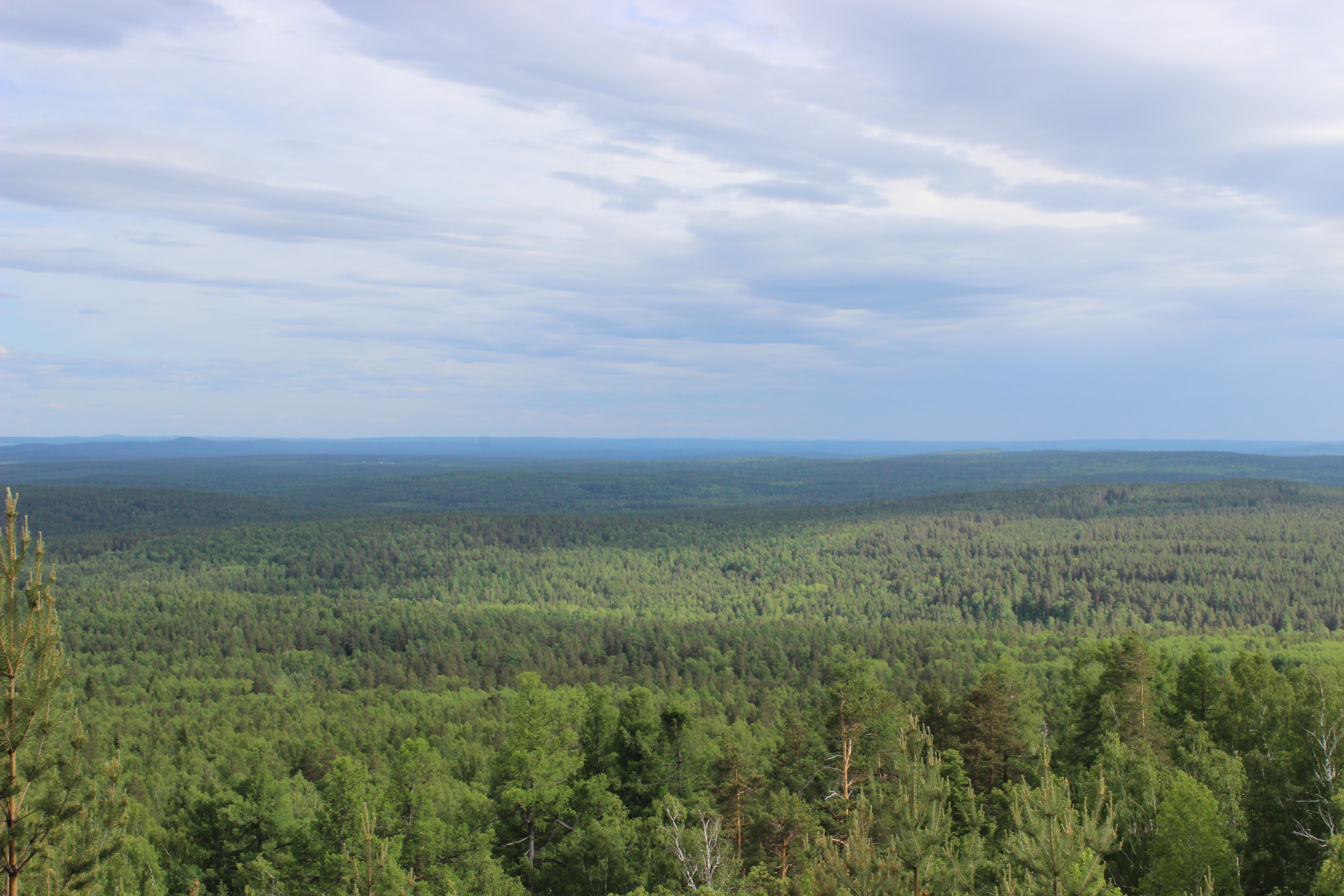 Гора "Азов", Полевской This image is related to the protected area of Russia number 6610536